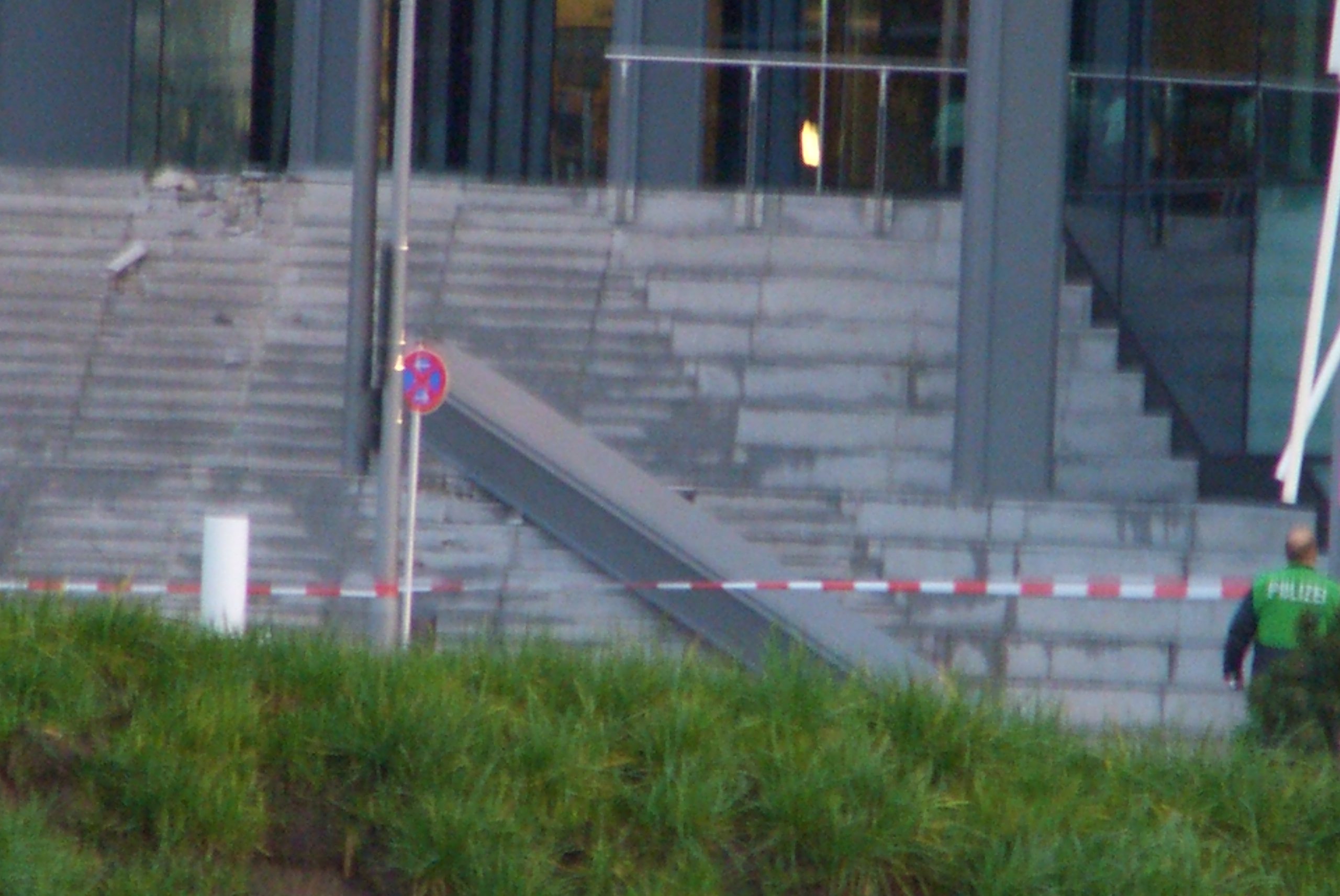 Sturmschaden am Berliner Hauptbahnhof durch Orkan Kyrill am 18/19.Januar 2007